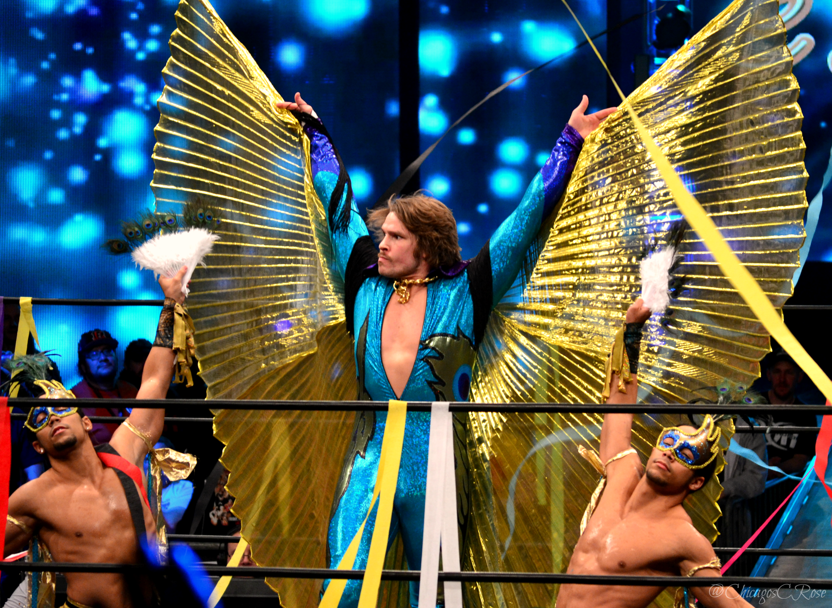 Dalton Castle entrant sur le ring avec ses boys en 2016.